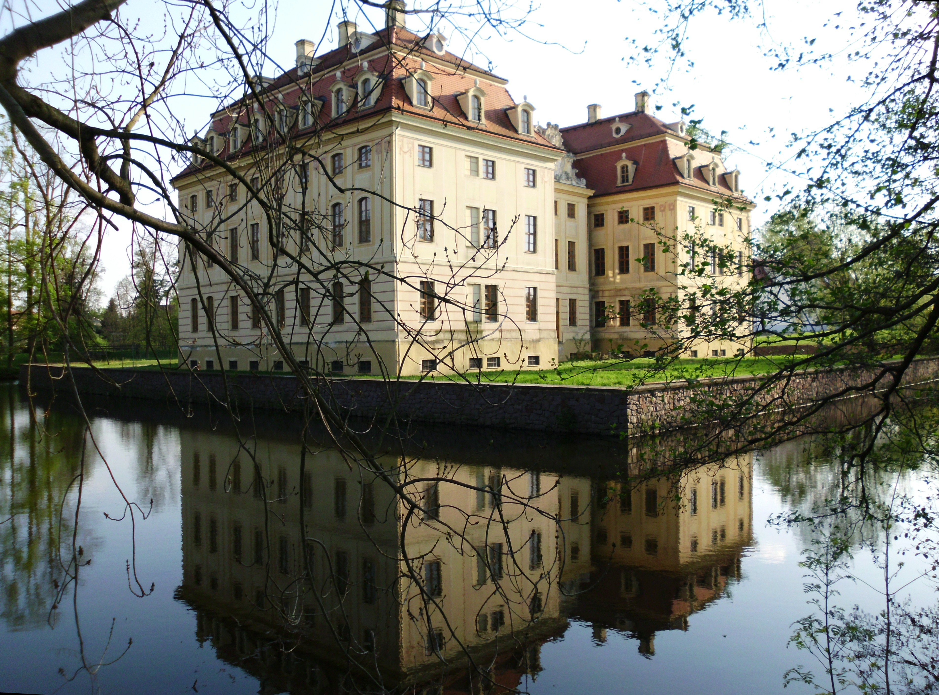 Wasserschloss Wachau, 01454 Wachau. 1730-1745 Neubau des Schlosses mit englischer Parkanlage durch Magdalena Sophie von Schönfeld. Teilweise saniert, zur Zeit leerstehend (?) Nord/ostansicht